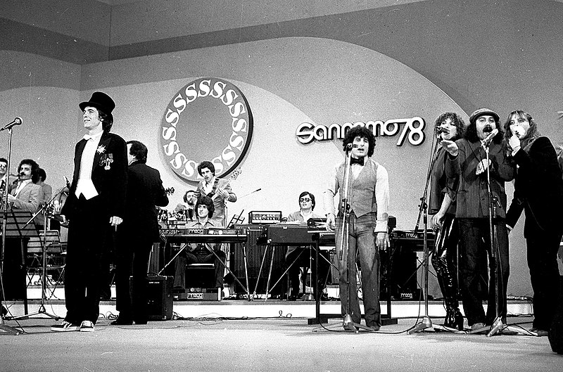 Rino Gaetano e i Pandemonium al Festival di Sanremo 1978